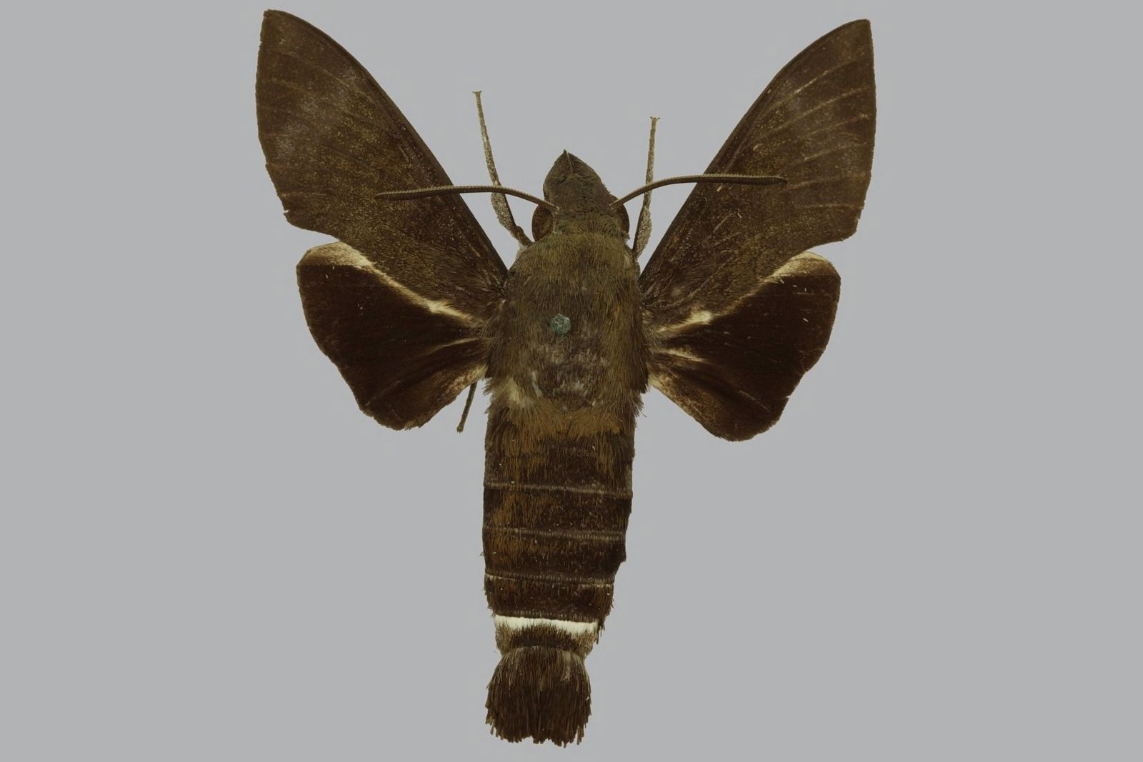 Macroglossum micacea albibase, male, upperside. Papua New Guinea, Solomon Is., Bougainville